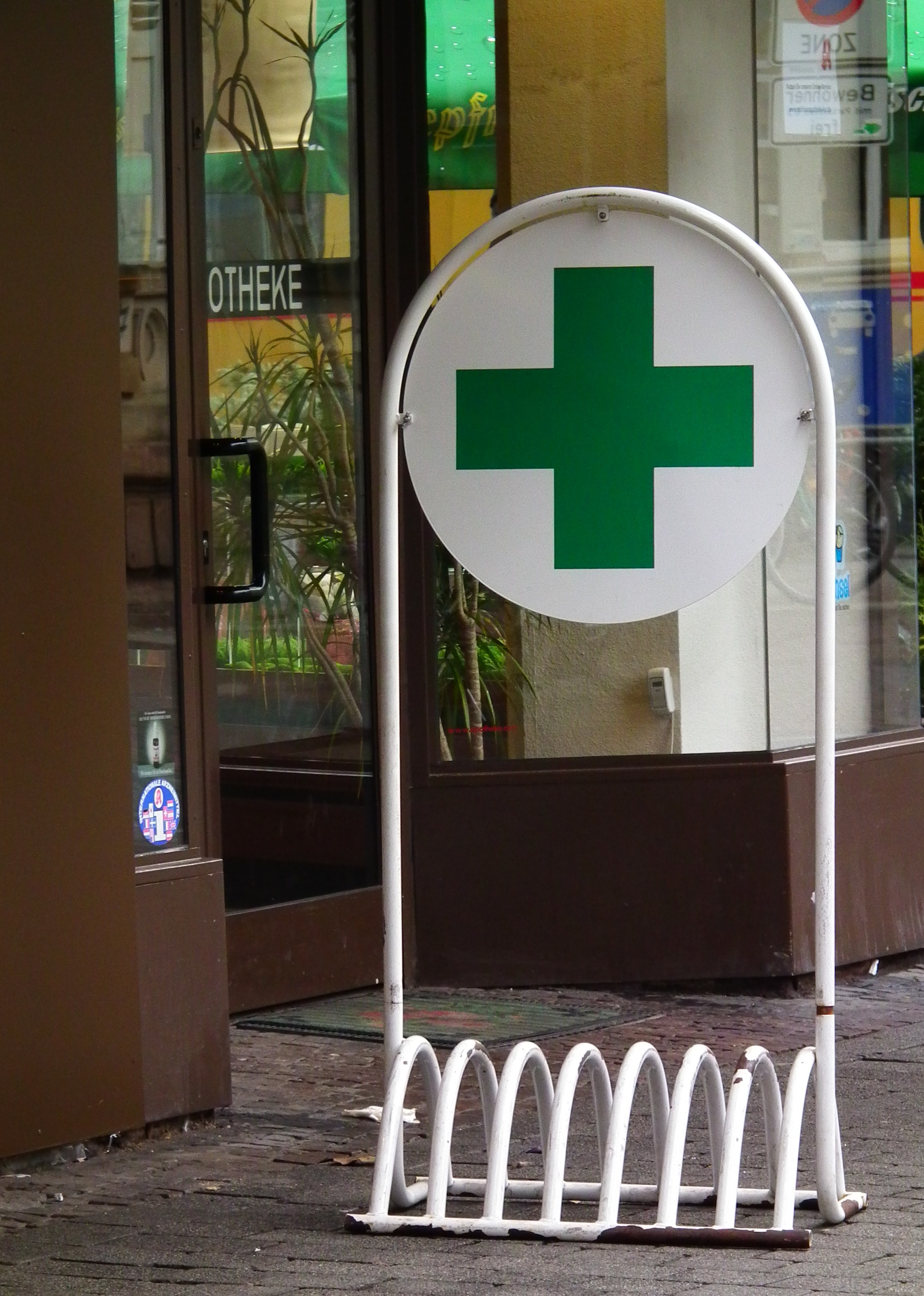 Fahrradständer vor einer Apotheke, fotografiert in Baden-Württemberg (Deutschland)